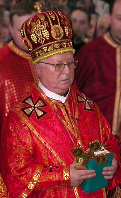 Український релігійний діяч, єпископ Тернопільсько-Зборівської єпархії УГКЦ Михаїл Сабрига.